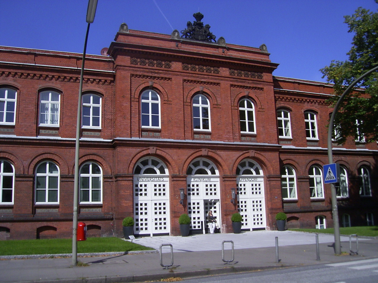 Der ehemalige Haupteingang des UKE in der Martinistraße in Eppendorf stammt aus dem Jahre 1885.